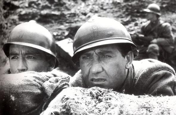 Vittorio Gassman e Alberto Sordi - Fuori scena de La grande guerra